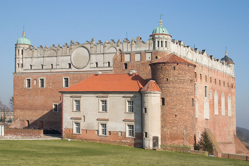 Golub-Dobrzyń castle. Author: Adam Kumiszcza